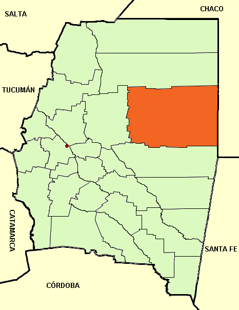 Mapa editado de: Santiago del Estero province (Argentina), departments and capital.png